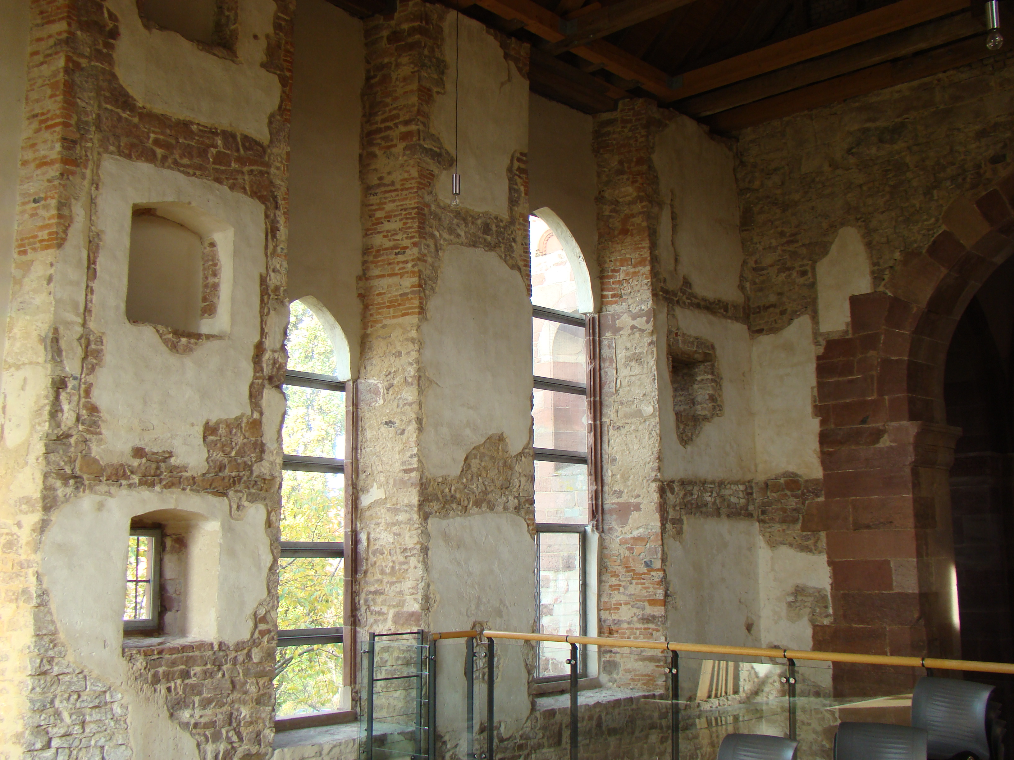 Klosterkirche Lobenfeld